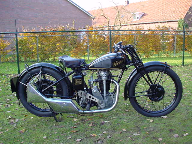 Velocette KSS 350 cc wegracer uit 1933 (let op de prachtige "Fishtail pipe").